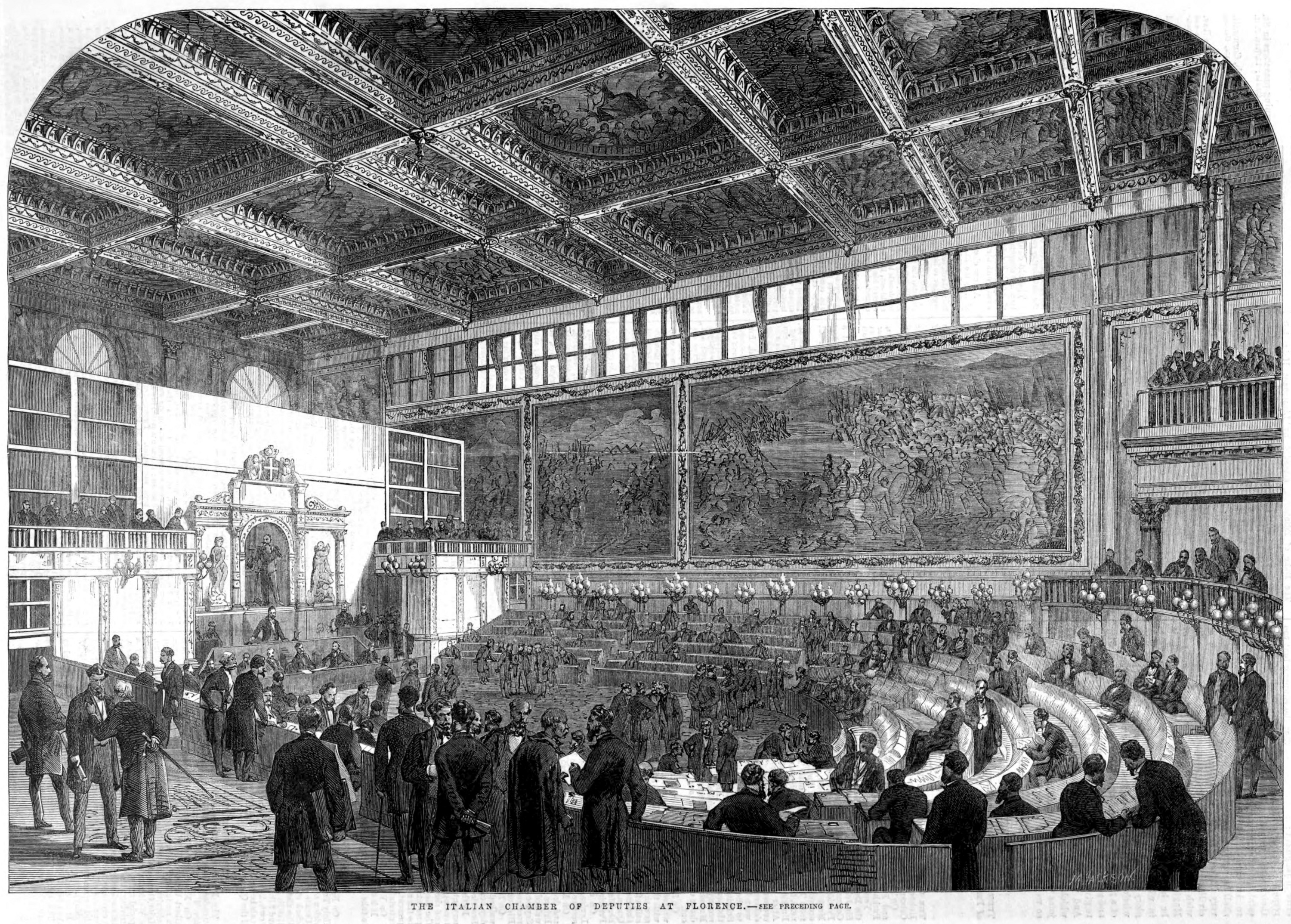 Camera dei Deputati a Firenze nel 1867